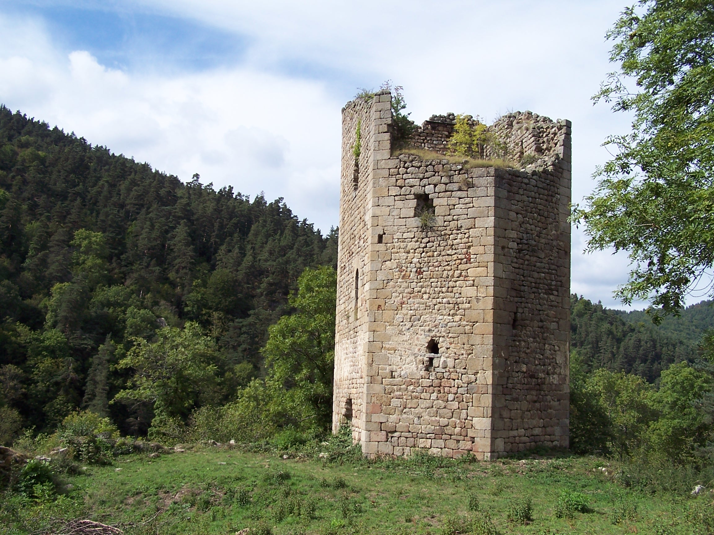 Vue sur la tour pentagonale datant de la fin du XIIe, début du XIIIe siècle, du château de Carry, à Grazac en Haute-Loire (43).